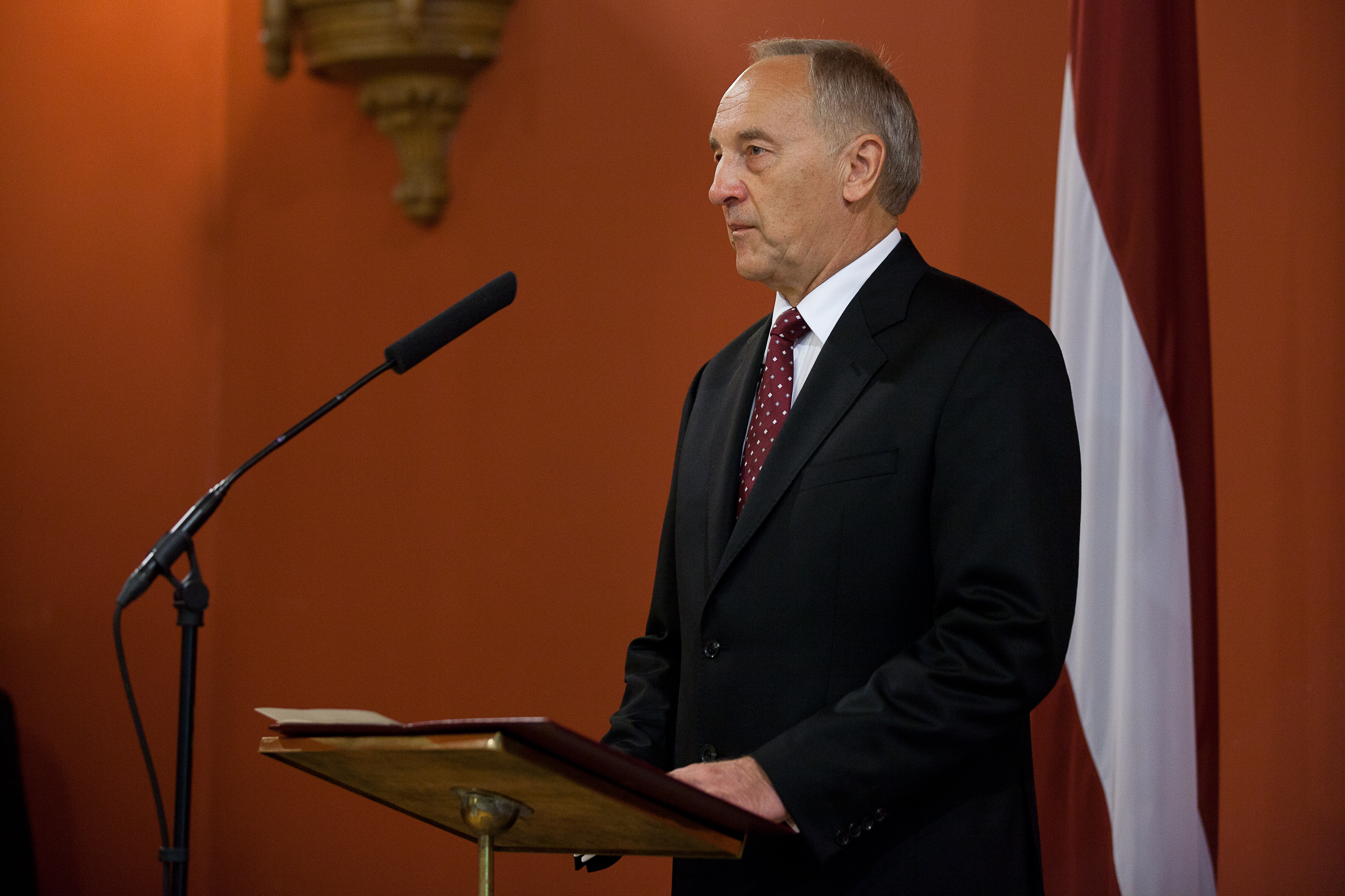 Andris Bērziņš 2011.gada 8.jūlijs. Valsts prezidents Andris Bērziņš saka uzrunu Saeimas Sarkanajā zālē. Foto: Saeima